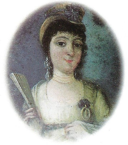 Retrato en miniatura de María Guadalupe Cuenca